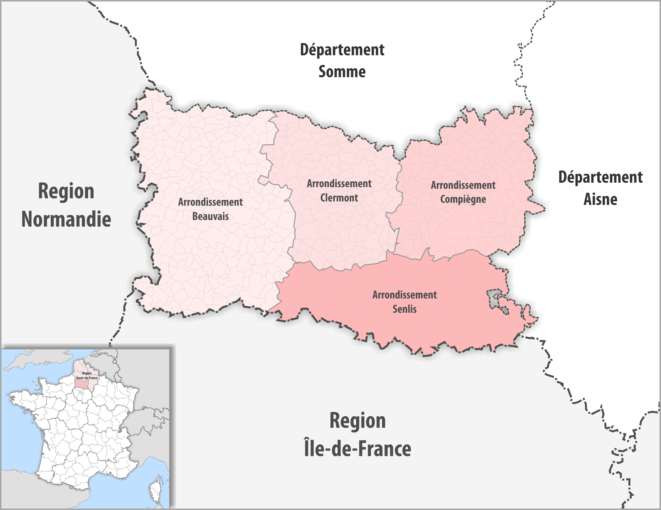 Gemeinden und Arrondissemente im Departement Oise